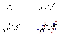 Cyclohexane hwoto draw